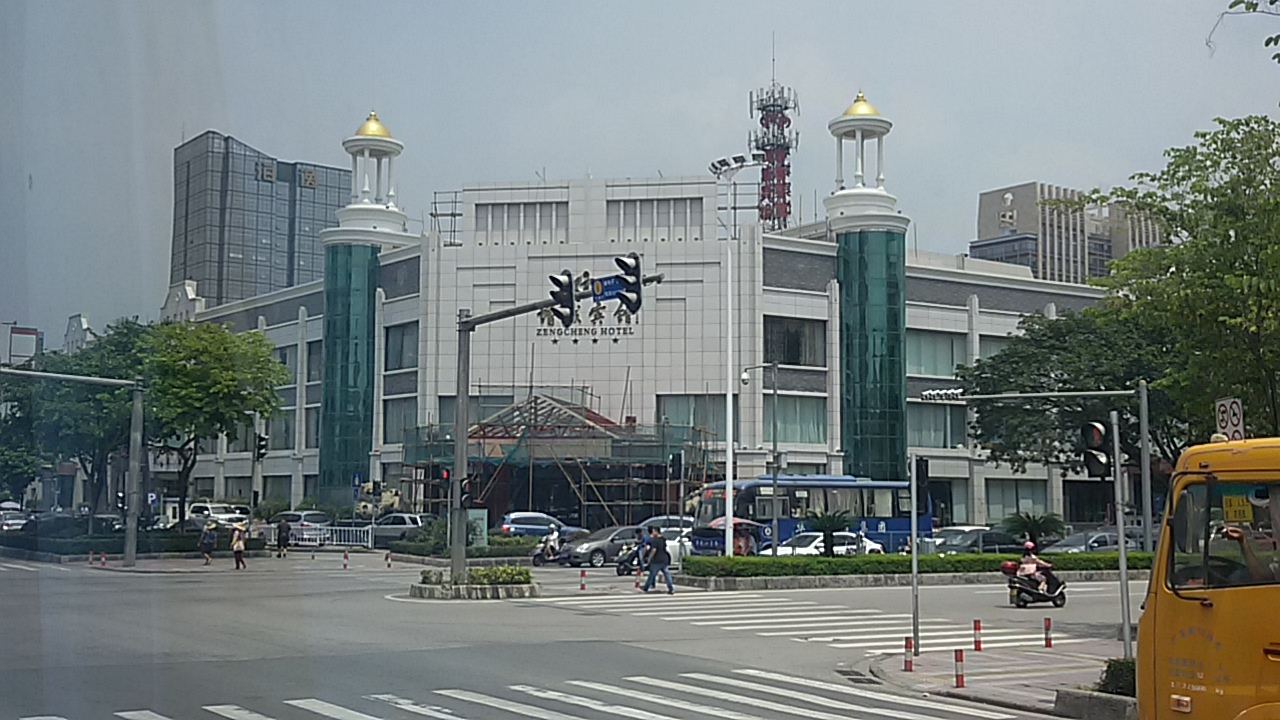 粵語: 增城賓館